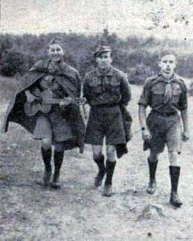 Беларускія скаўты, 1937 год. Здымак з часопіса "Шлях моладзі". Кіраўнікі віленскай беларускай дружыны скаўтаў на злёце К. Паўл (з гітарай), Кетурка і Жыткоўскі